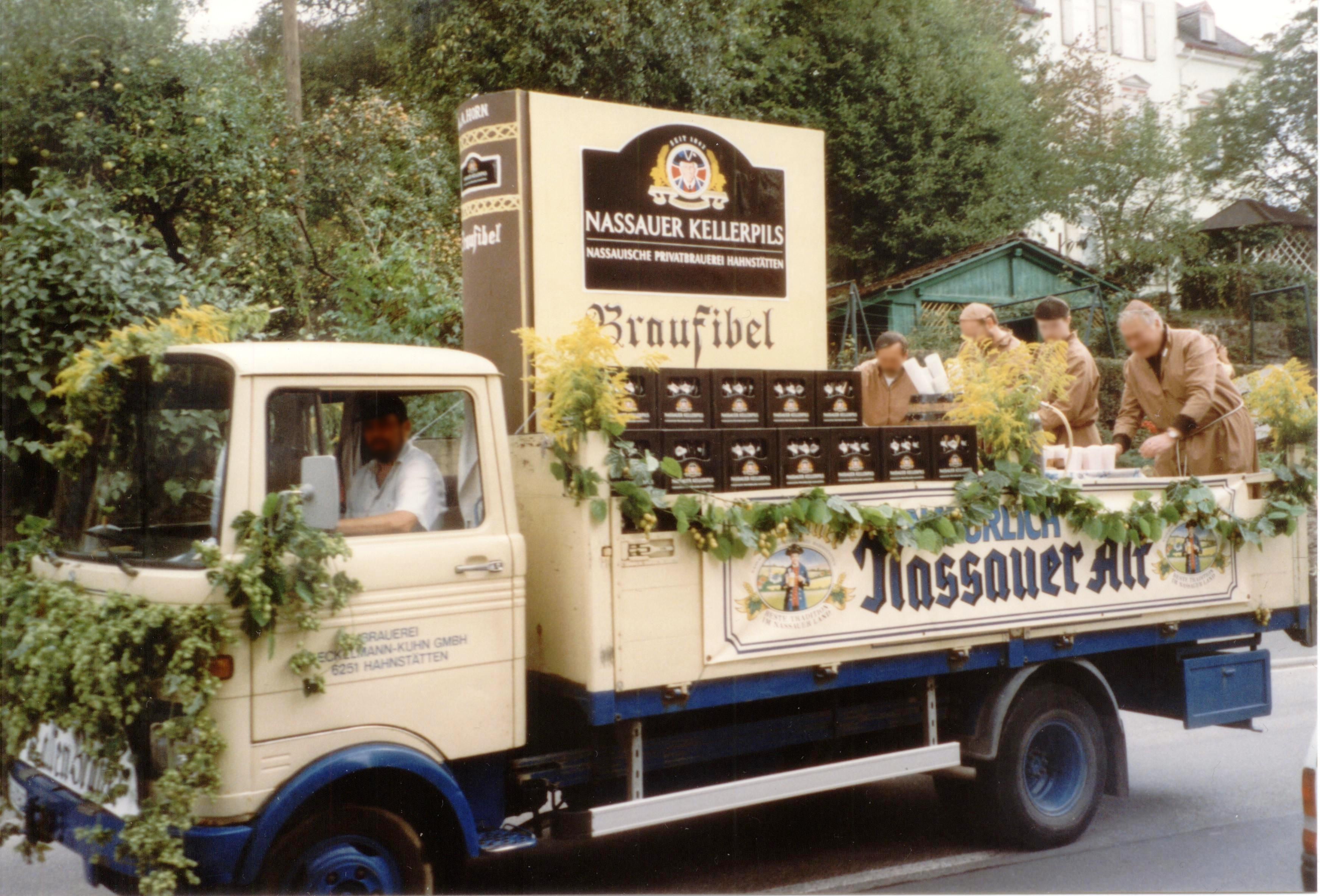 Nassauische Privatbrauerei Festwagen 1996